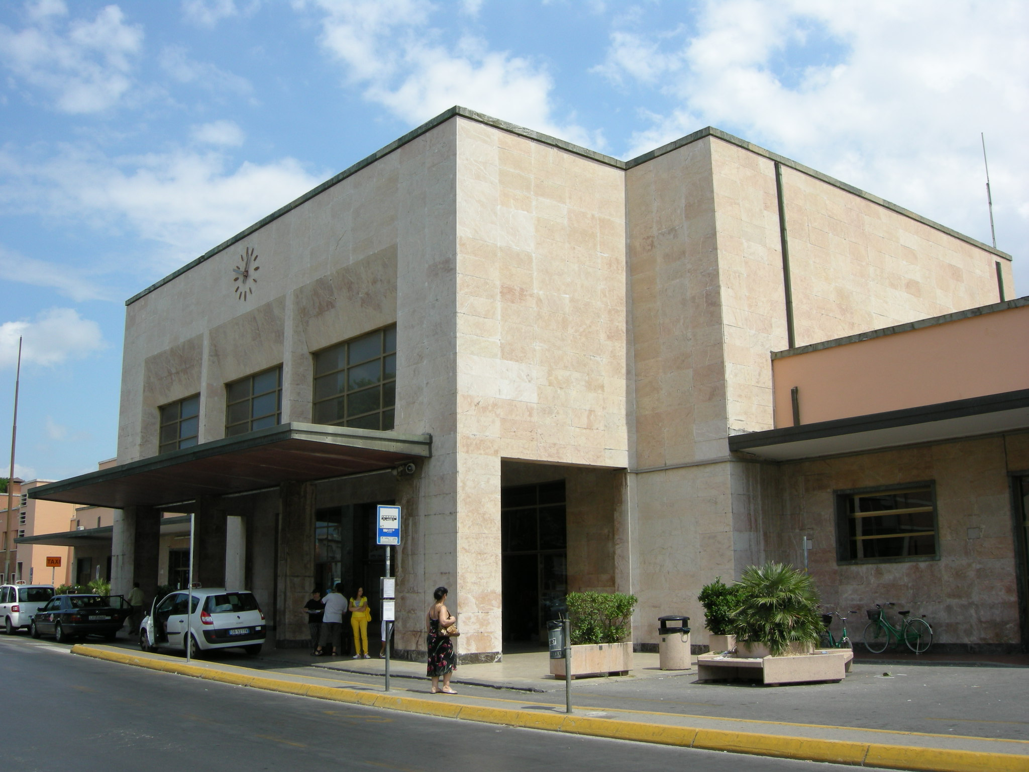 Stazione di viareggio